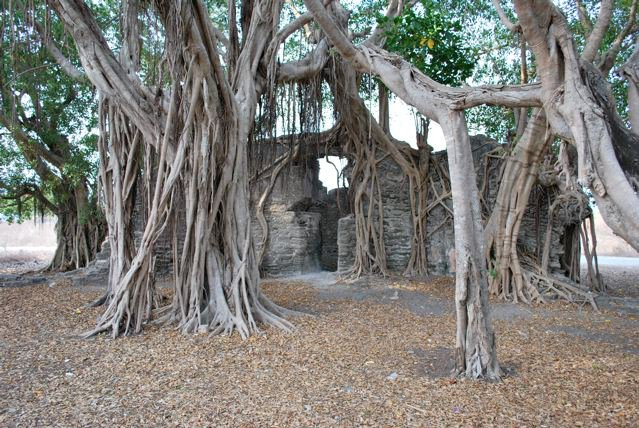 Ruine des Hauses des portugiesischen Kolonialadministrators in Suai Loro. In den Räumlichkeiten befand sich auch ein Gefängnis.